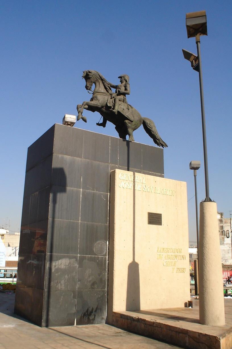 MINUMENTO AL GENERAL JOSE DE SAN MARTIN